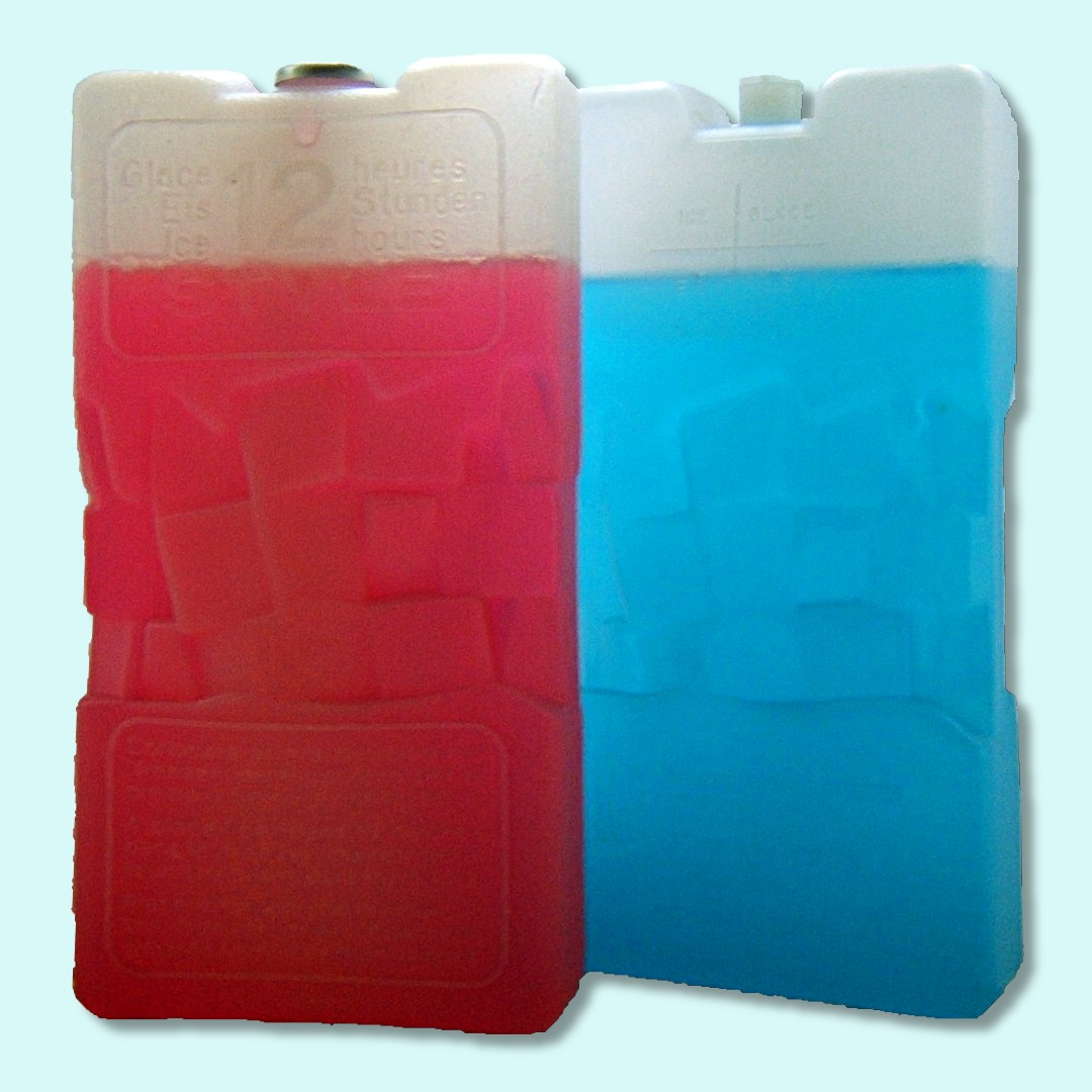 siberino